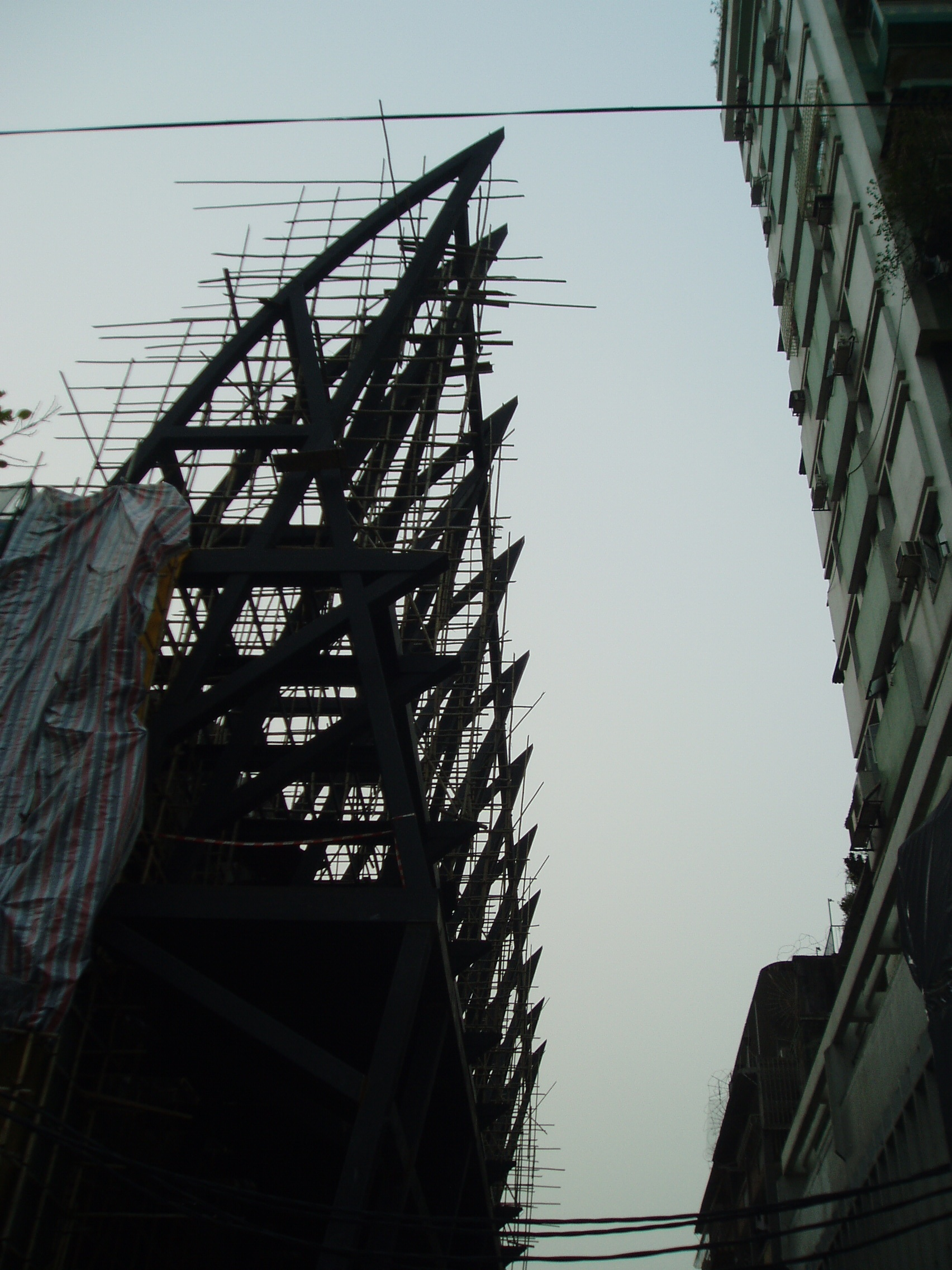 塔石廣場魔鬼之爪